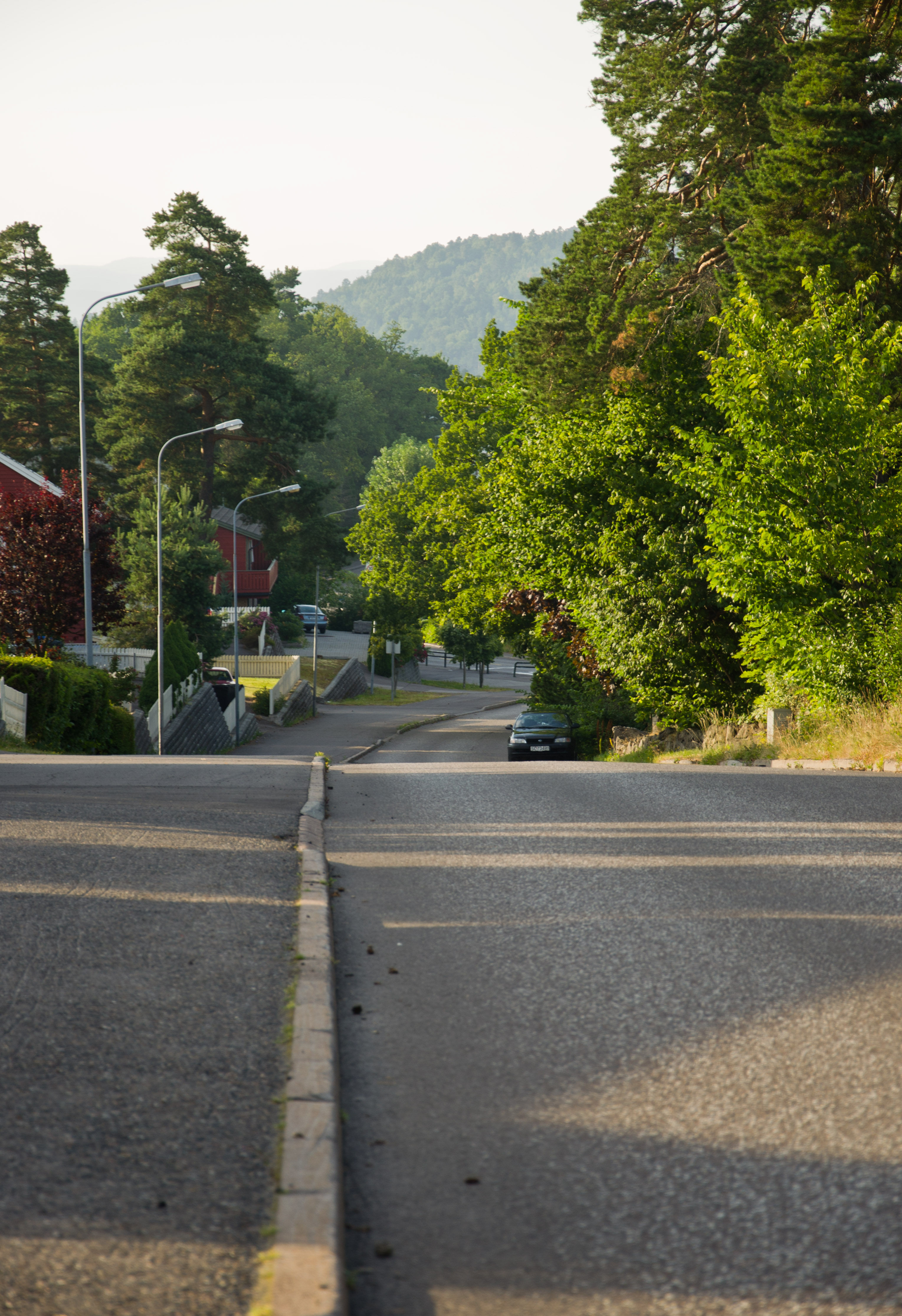 Fylkesvei 710 Apenesbakken i Horten